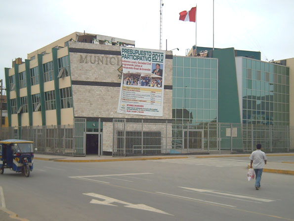 Municipalidad de Puente Piedra